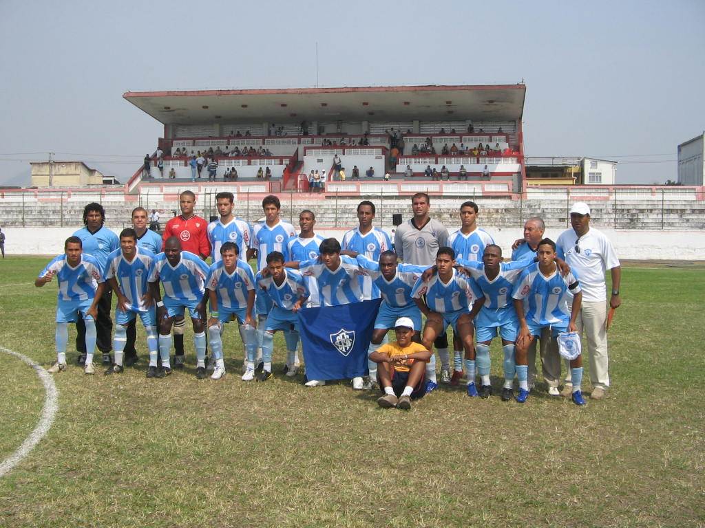 Equipe profissional do Canto do Rio em 2007. Foto de Paulo Roberto Rodrigues.